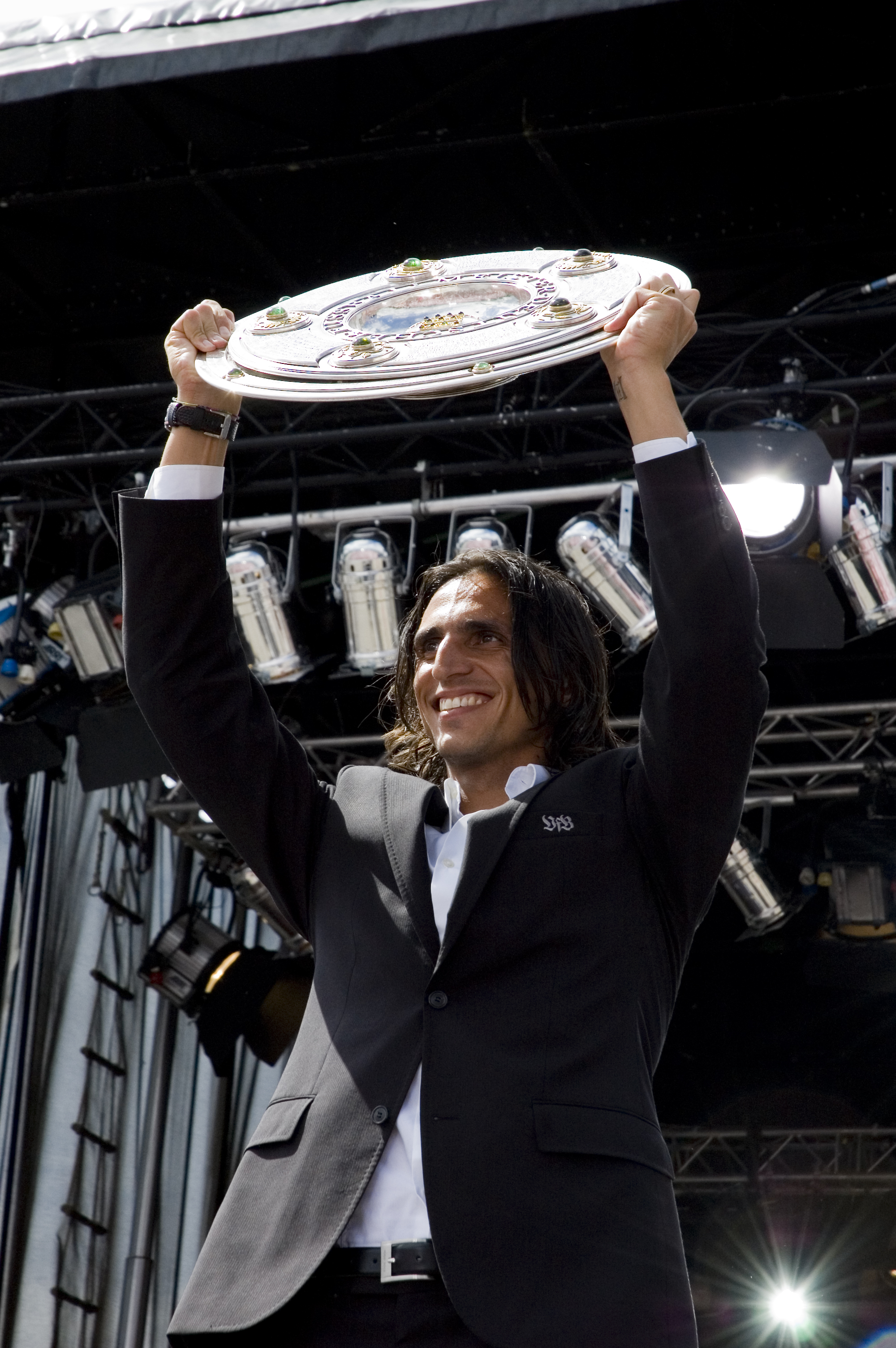 Fernando Meira bei der Meisterfeier des VfB Stuttgart